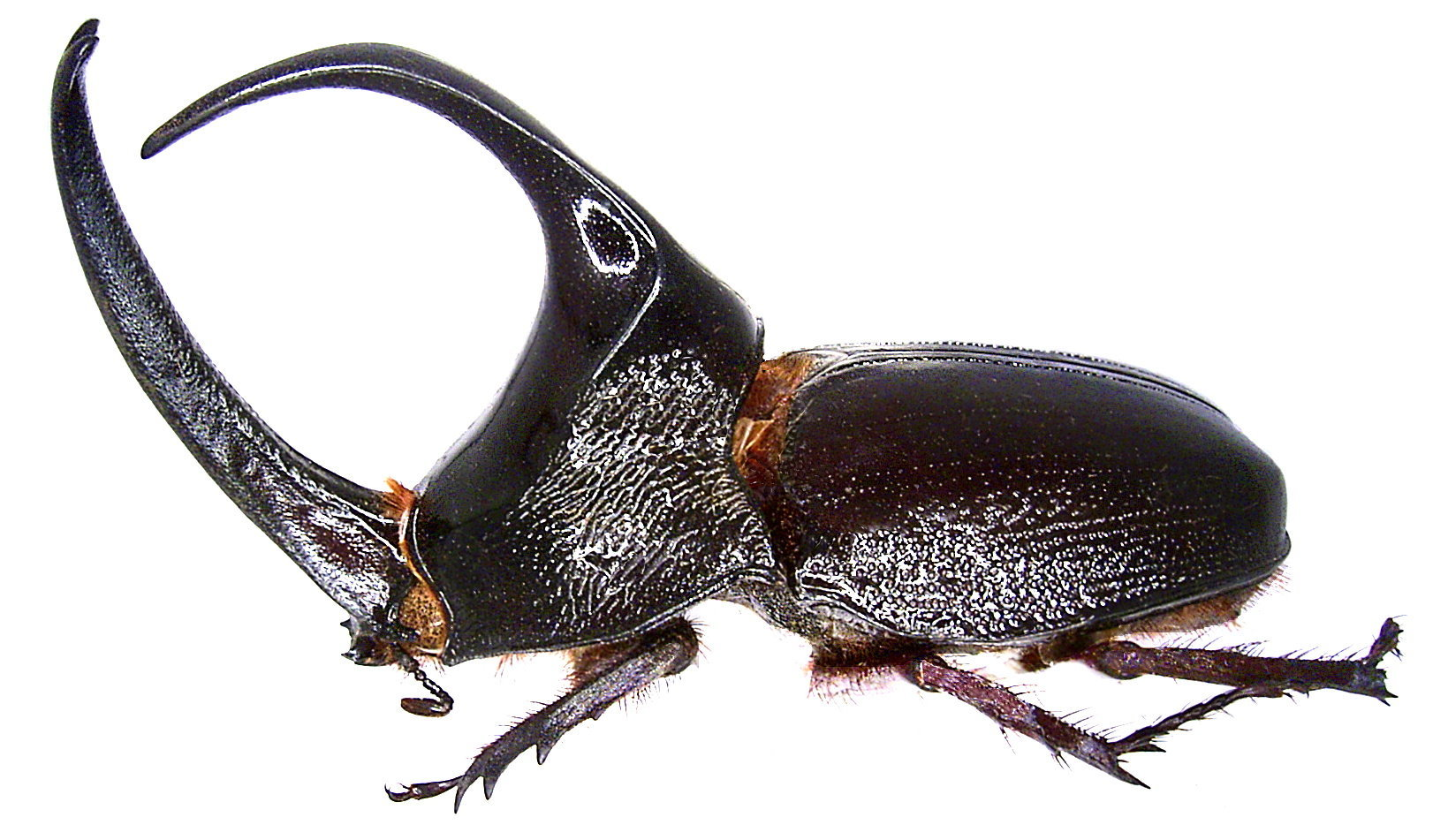 Familie: Scarabaeidae Grösse: 45 mm Verbreitung: Süd-Mexiko, Kolumbien, Ekuador, Peru, Brasilien Fundort: Peru, Dep. Madre de Dios, Salvacion, Manu-Park leg. 1997; det. U.Schmidt Foto: U.Schmidt, 2005